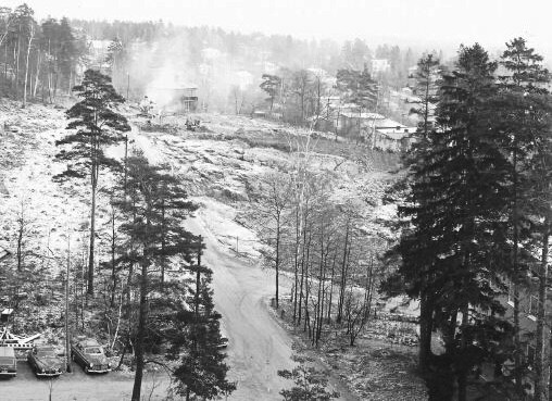 Anläggningsarbetena för Saltsjöbadsleden börjar